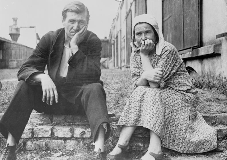 Westpreußen, Russlanddeutsche Flüchtlinge Russland, ein deutsches Bauernehepaar aus dem Wolgagebiet im Flüchtlingslager Schneidemühl (Grenzmark Posen-Westpreussen). Information added by Wikimedia users.